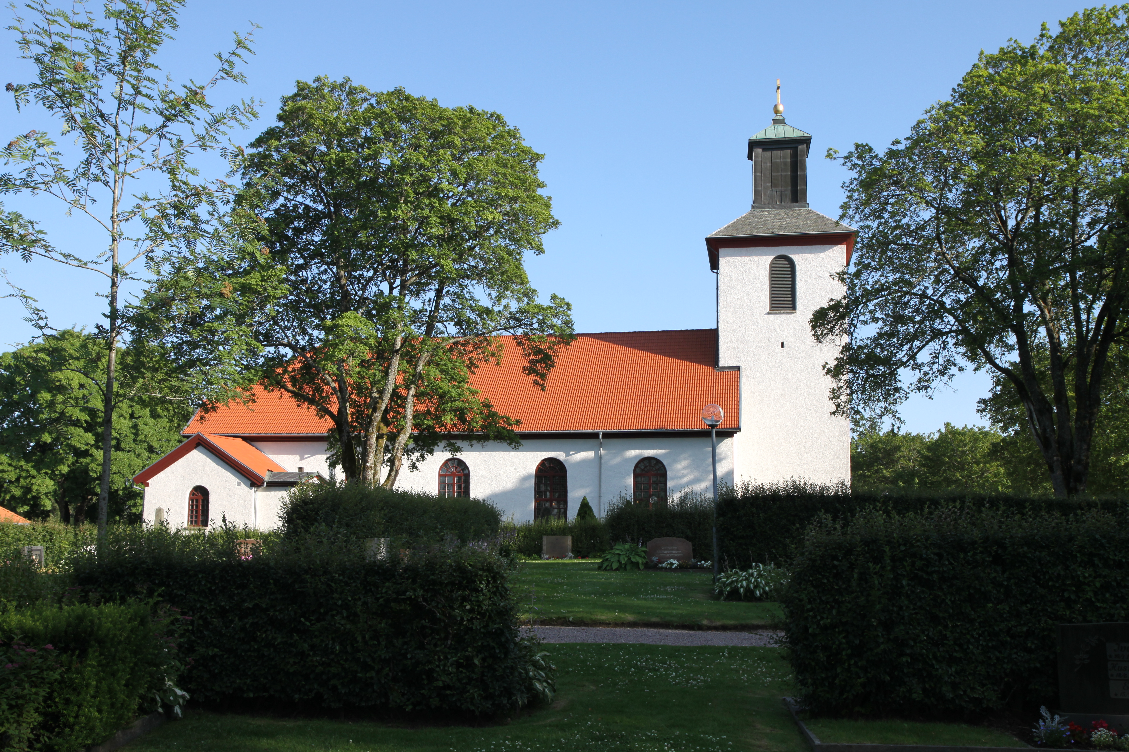 Bredareds kyrka.